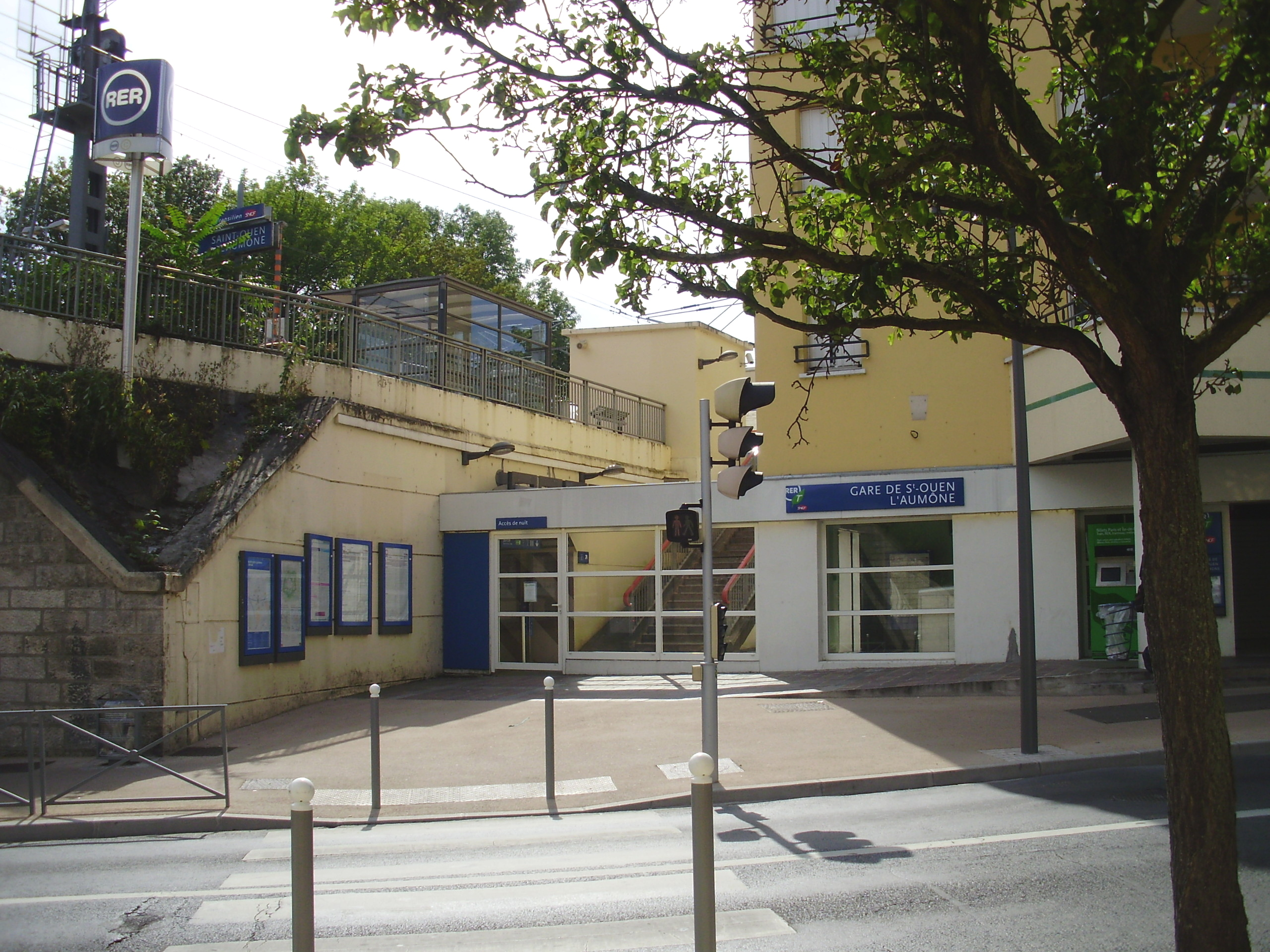 Gare de Saint-Ouen-l'Aumône, Val-d'Oise, France : entrée principale rue du Général-Leclerc (côté nord des voies)